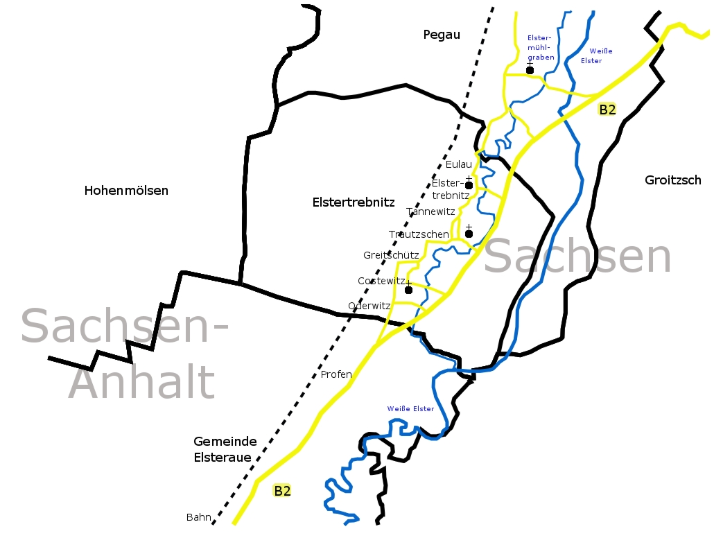 Karte von Elstertrebnitz und angrenzende Gemeinden